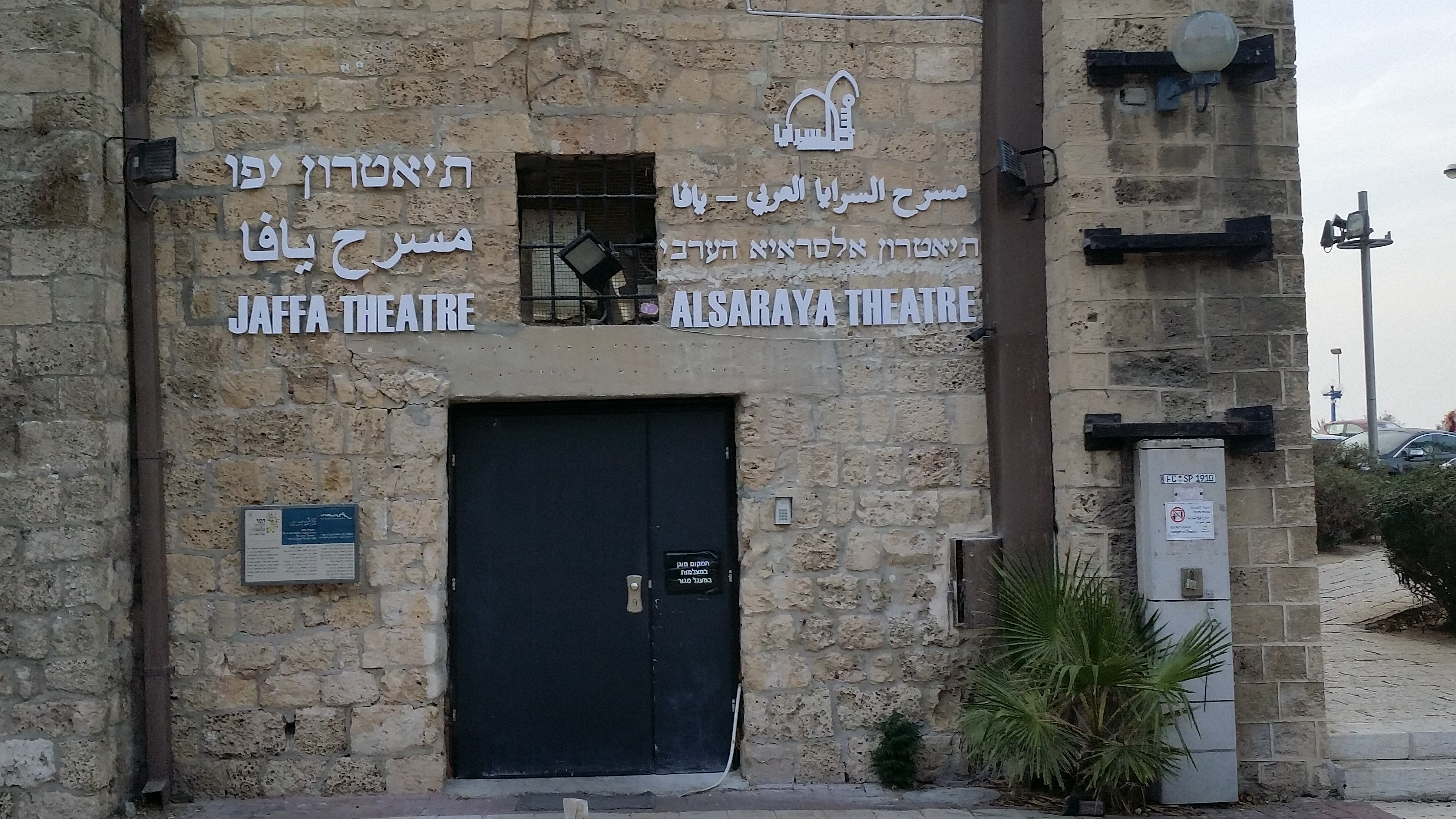 חזית התיאטרון הערבי-עברי עם כיתוב חדש שבו הושמט ה"עברי" י